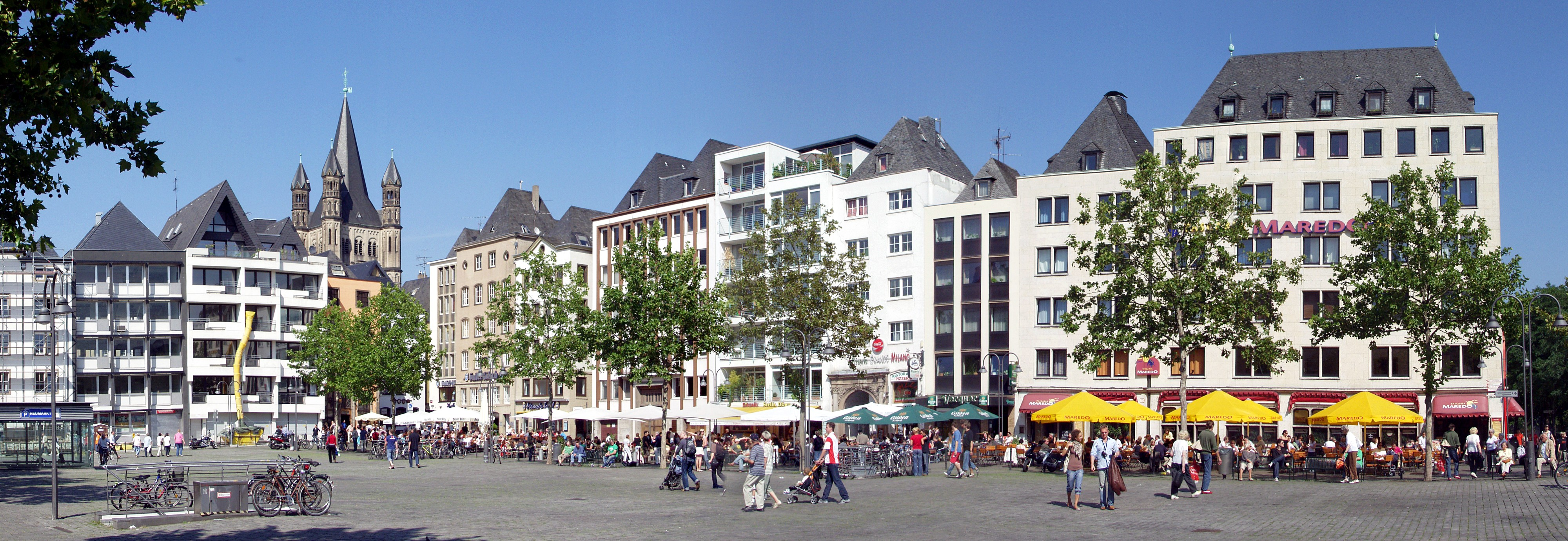 Heumarkt in Köln, Ansicht von Westen.